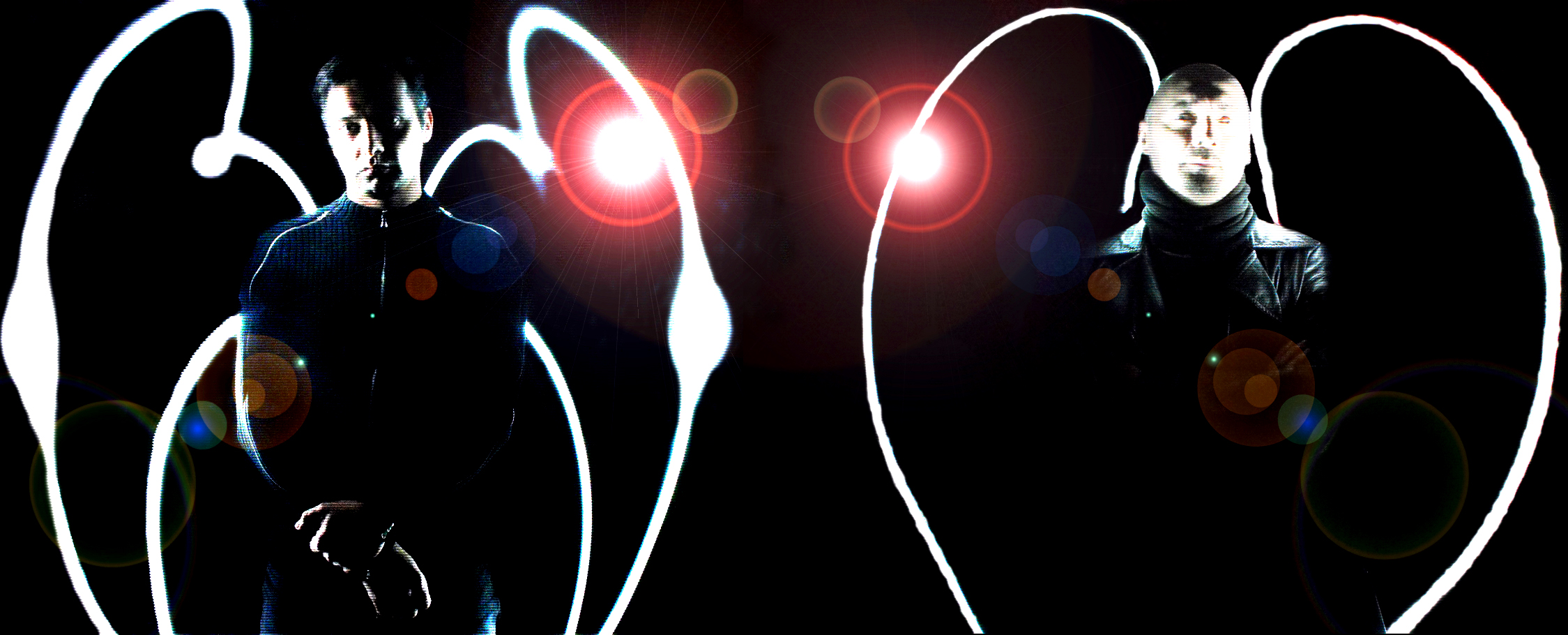 John Vallejo e Salvador Vallejo, i due componenti del progetto musicale ERP-Exit Refugium Peccatorum